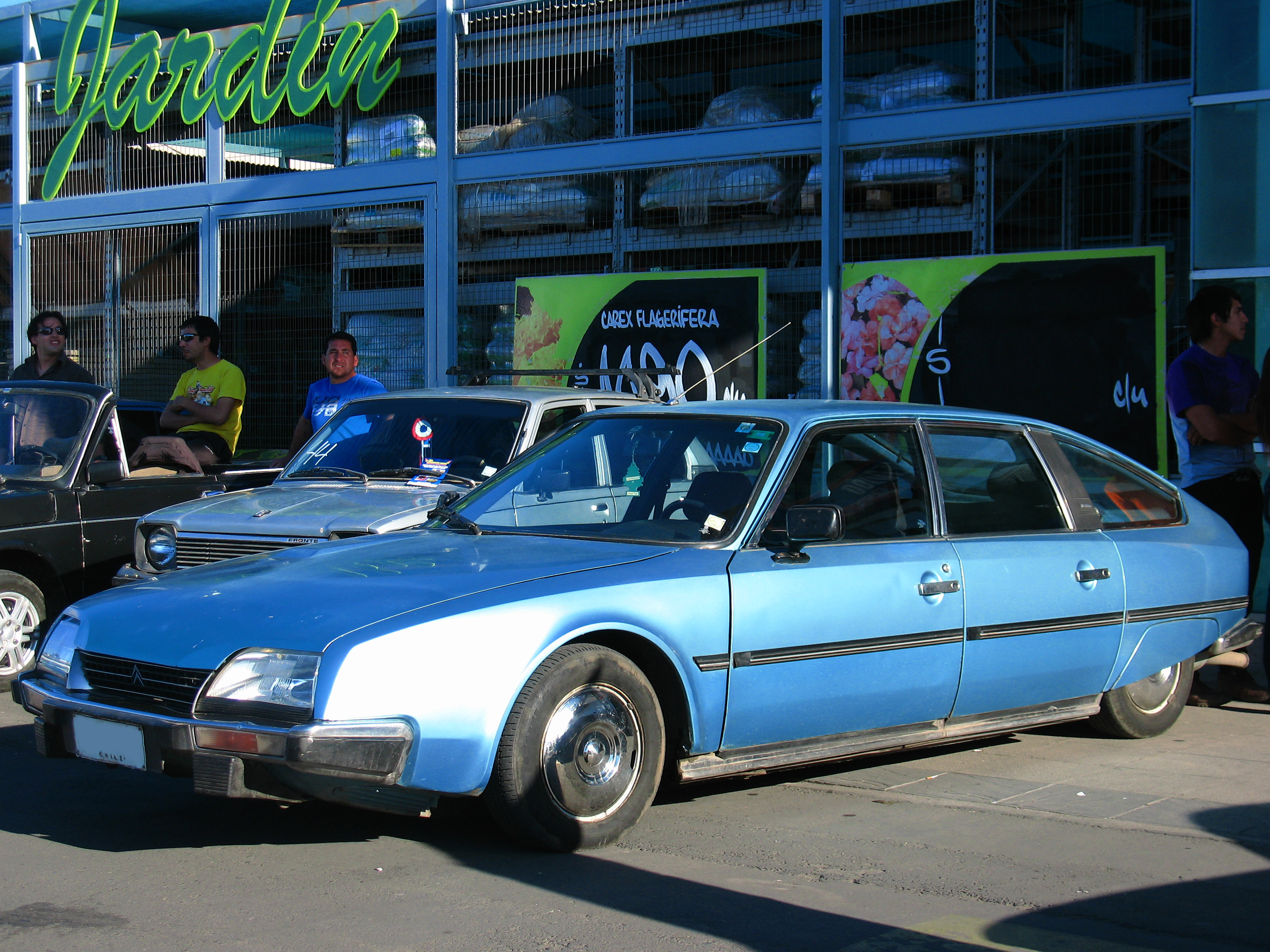 Citroen CX 2000 Pallas 1983